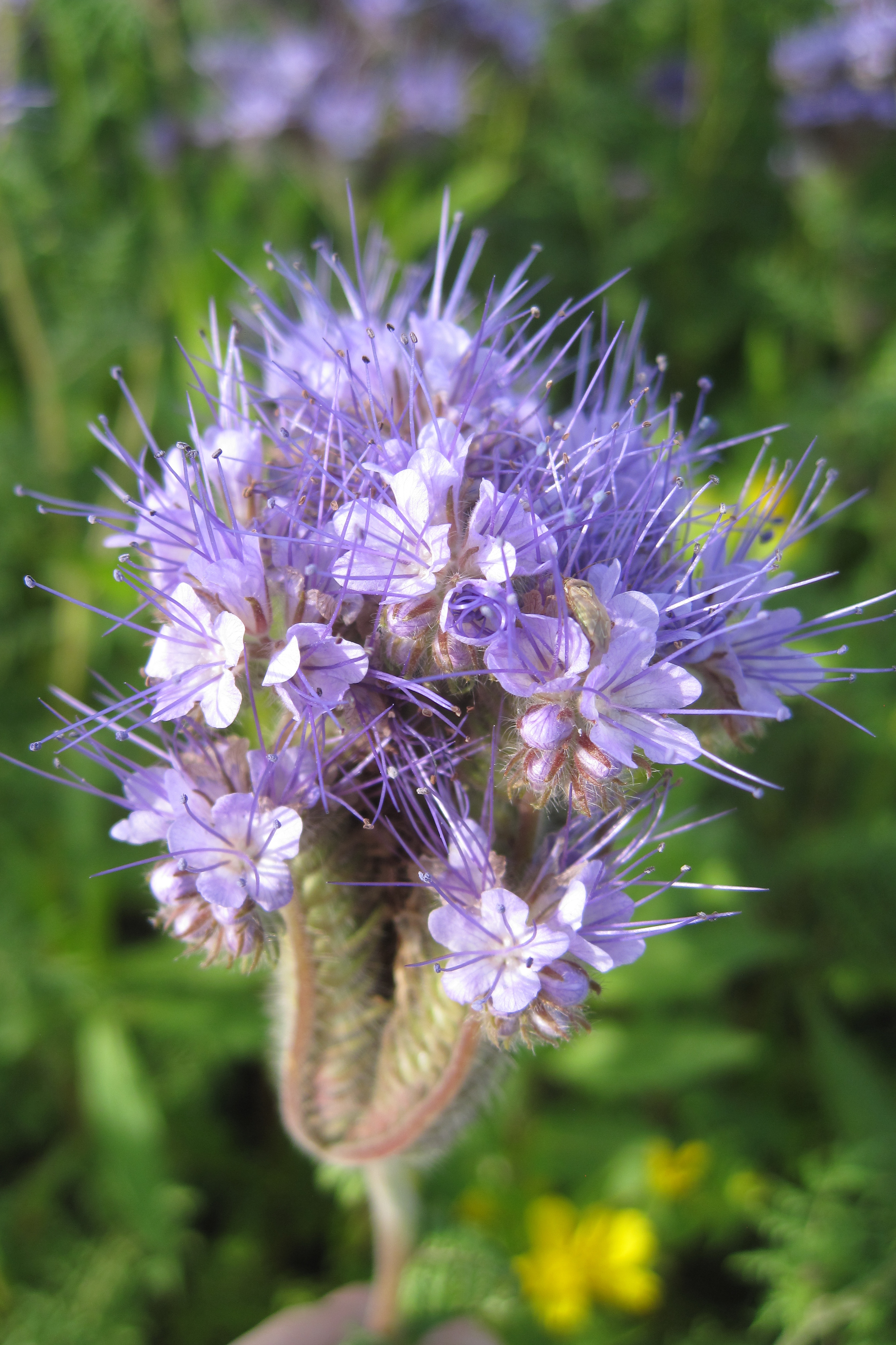 Blüte der Rainfarn-Phazelie (Phacelia tanacetifolia) in Ense, Soester Straße/Radberg.